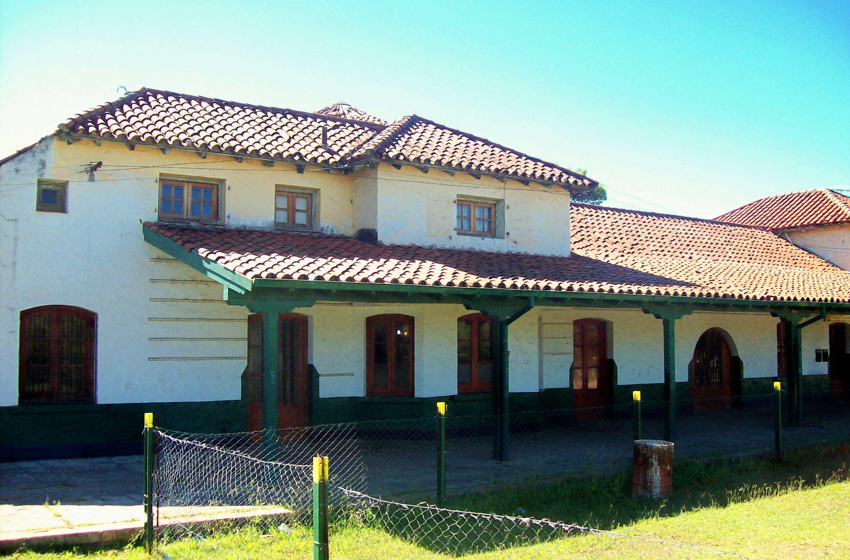 ex Estación de Valle Hermoso, provincia de Córdoba, Argentina, (convertida en Museo y Centro Cultural). Foto tomada de NO a SE